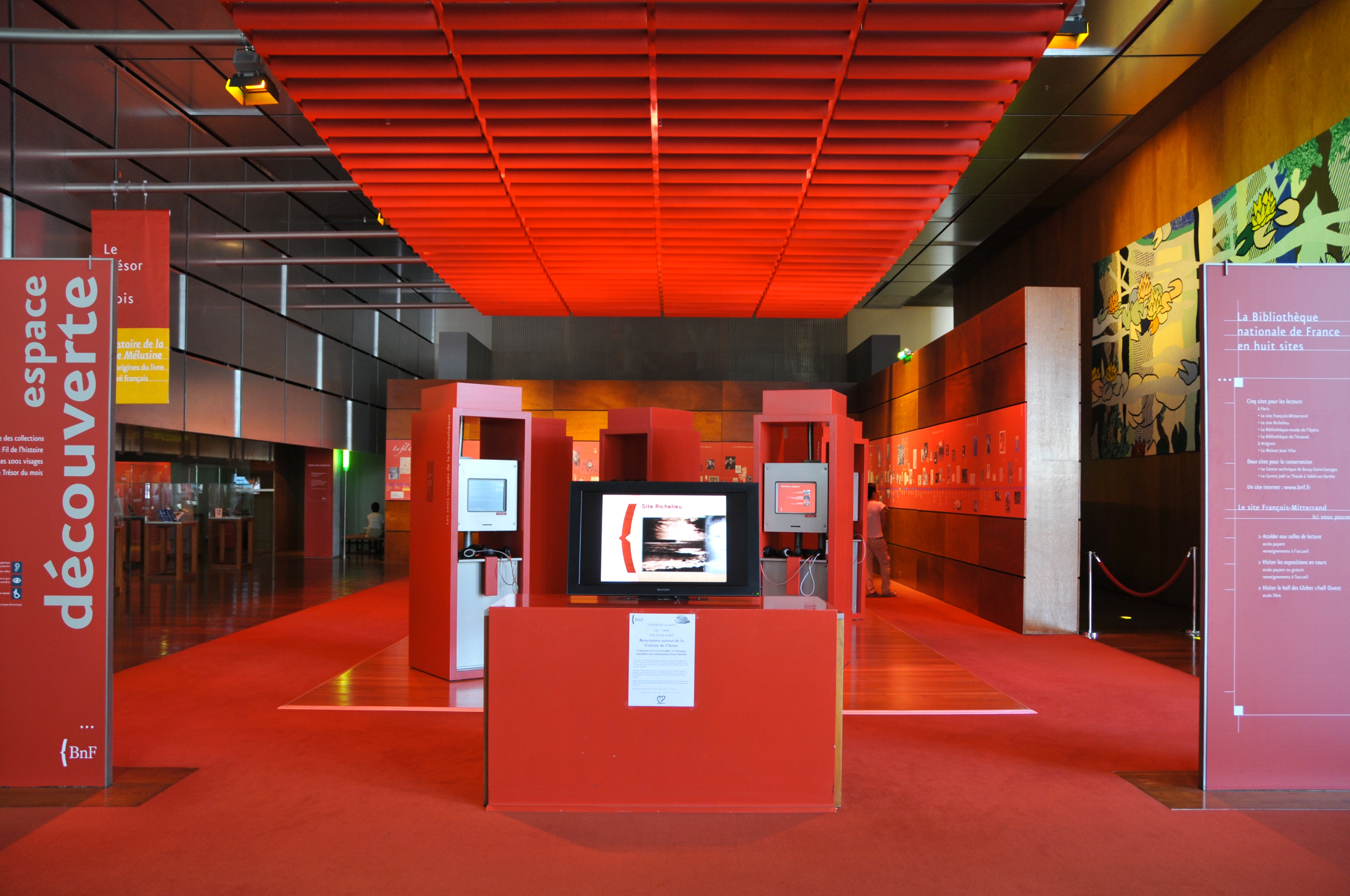 Bibliothèque nationale de France Site Tolbiac